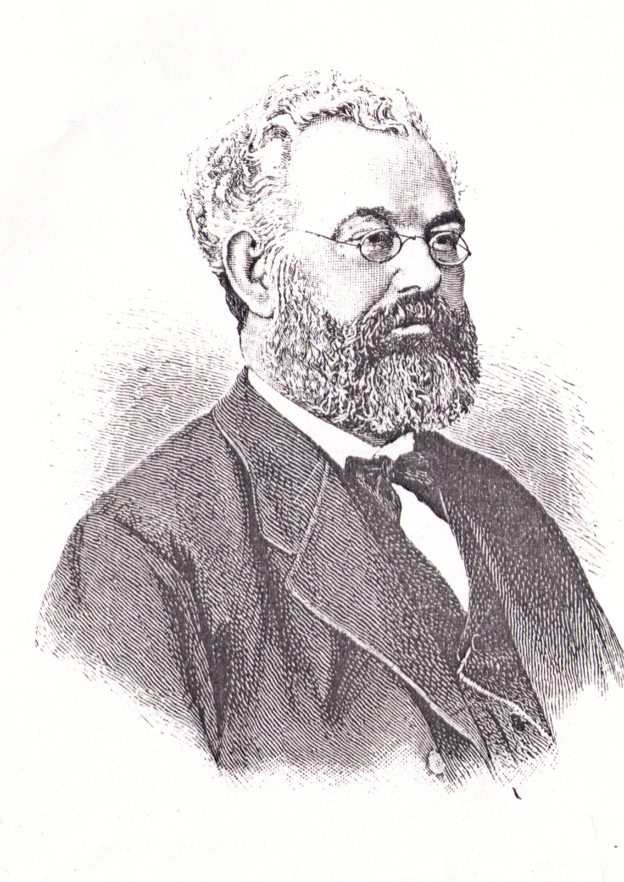 Johann Joseph Fühling, German agricultural scientist